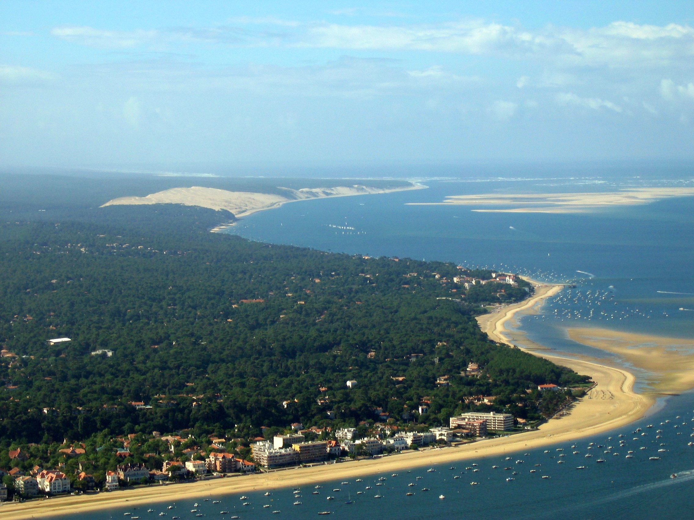 L'ouest de la ville d'Arcachon et la Dune du Pilat.